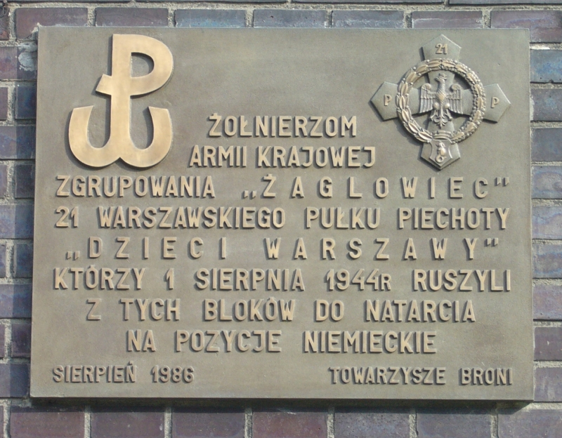 Tablica pamiatkowa na scianie budynku przy ul. Dyminskiej 10 na Zoliborzu